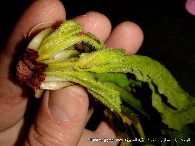 نباتات برية سورية تؤكل